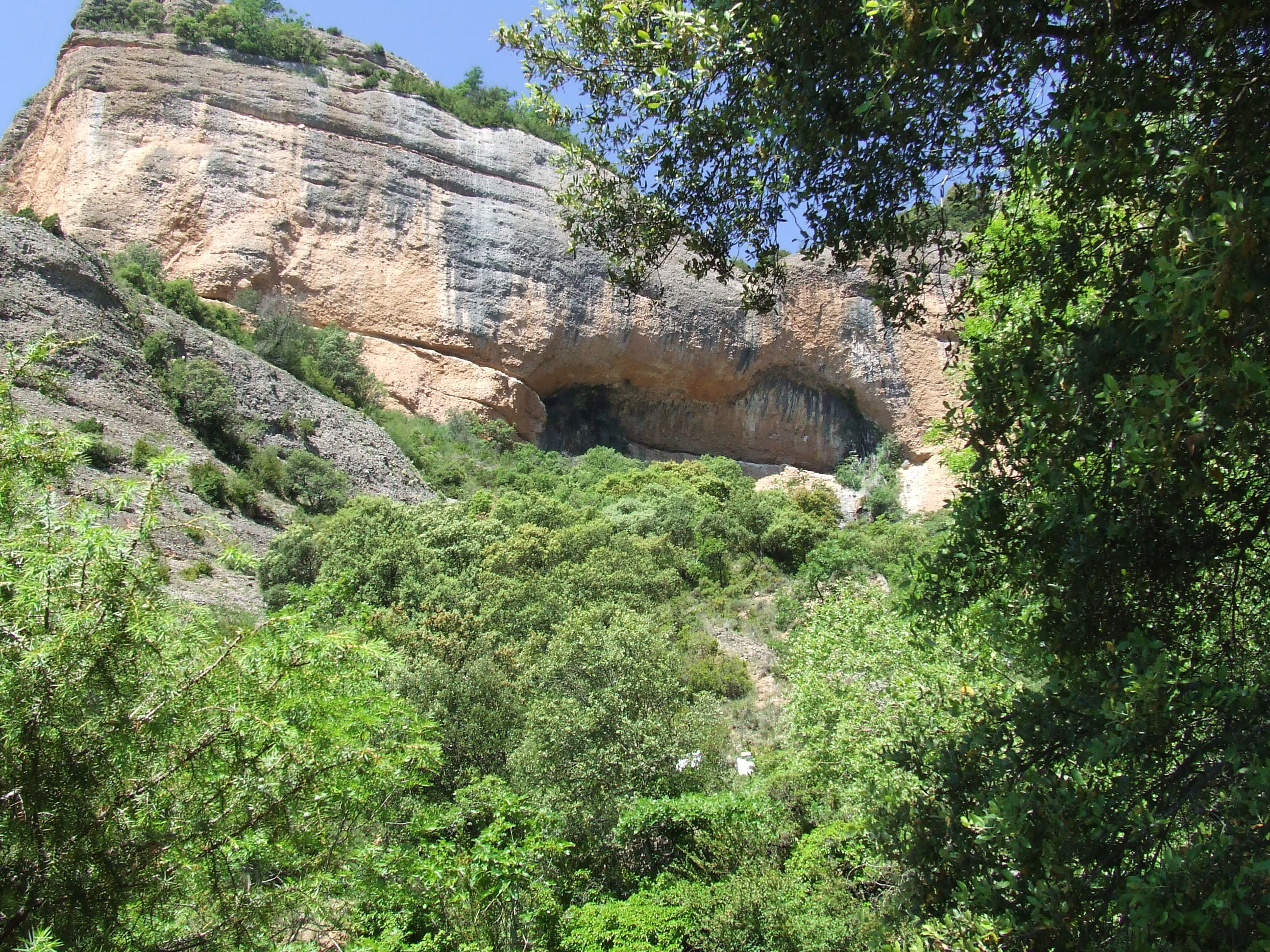 Cova de Sorta (Serradell, Toralla i Serradell, Conca de Dalt, Pallars Jussà)